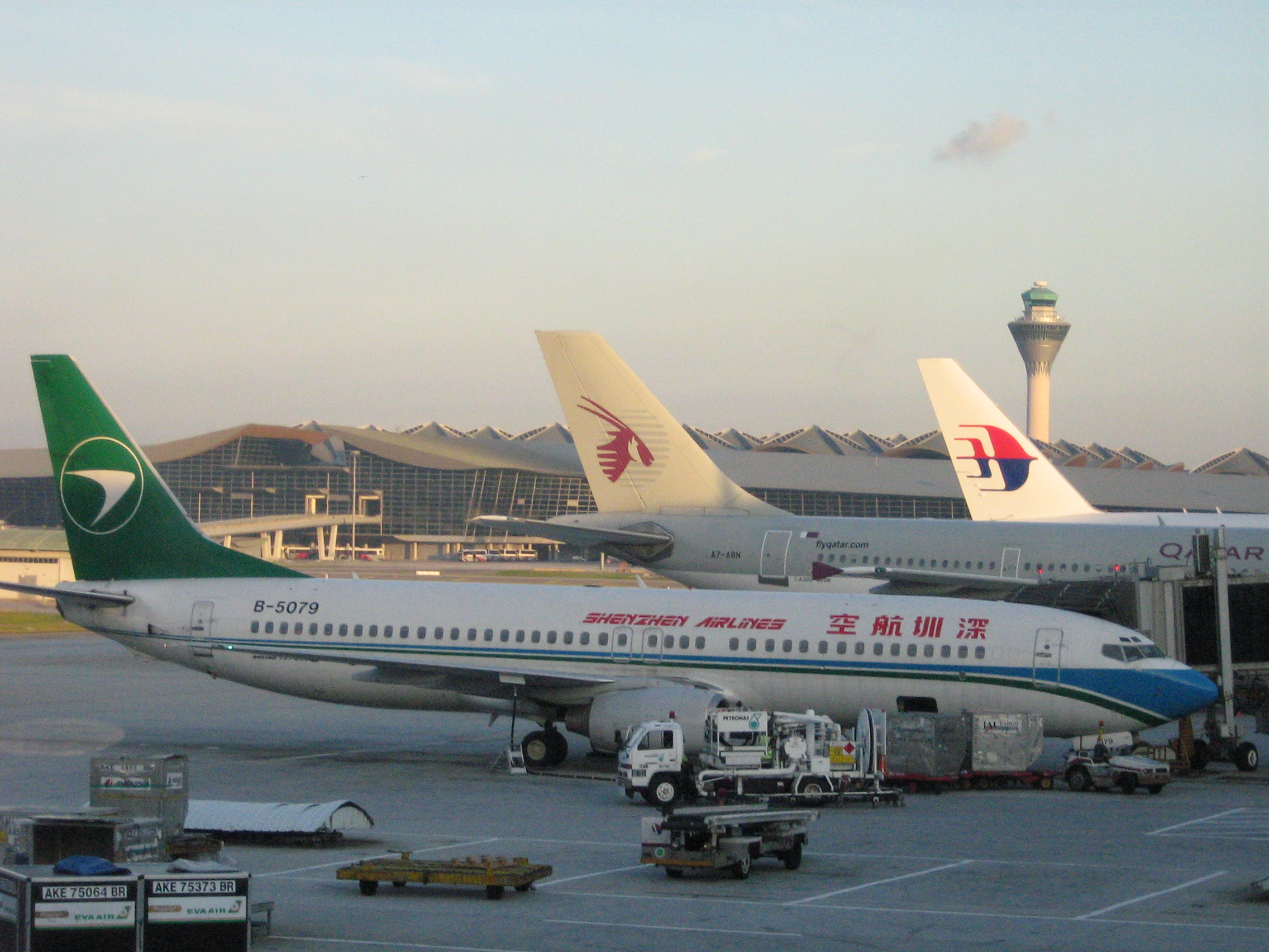 Shenzen Airlines' Boeing 737 at Kuala Lumpur International Airport